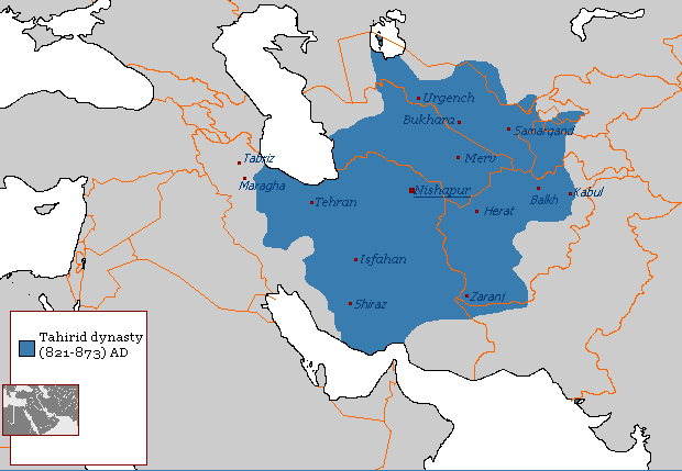 Tahirid dynasty